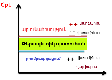 Վարֆարինի դոզայի բարձրանալուն պես, բարձրանում է նաև հնարավոր արյունահոսության ռիսկը։ Եվ հակառակը, եթե վարֆարինի քանակը քիչ է, աճում է թրոմբագոյացման ռիսկը։ Այս պարագայում առկա է նեղ միջակայք՝ թերապևտիկ պատուհան, երբ վարֆարինի օգտագործման առավելությունները գերազանցում են ռիսկը: Որոշ դեղամիջոցներ, բույսեր կարող են փոխազդել վարֆարինի հետ՝ ուժեղացնելով կամ ընճելով նրա ազդեցությունը։